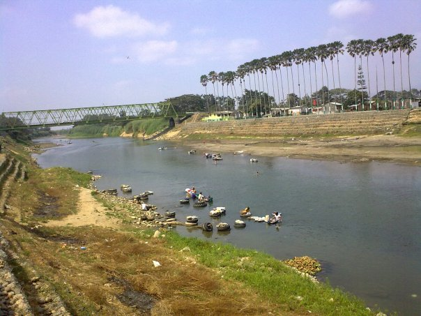 río Catarama